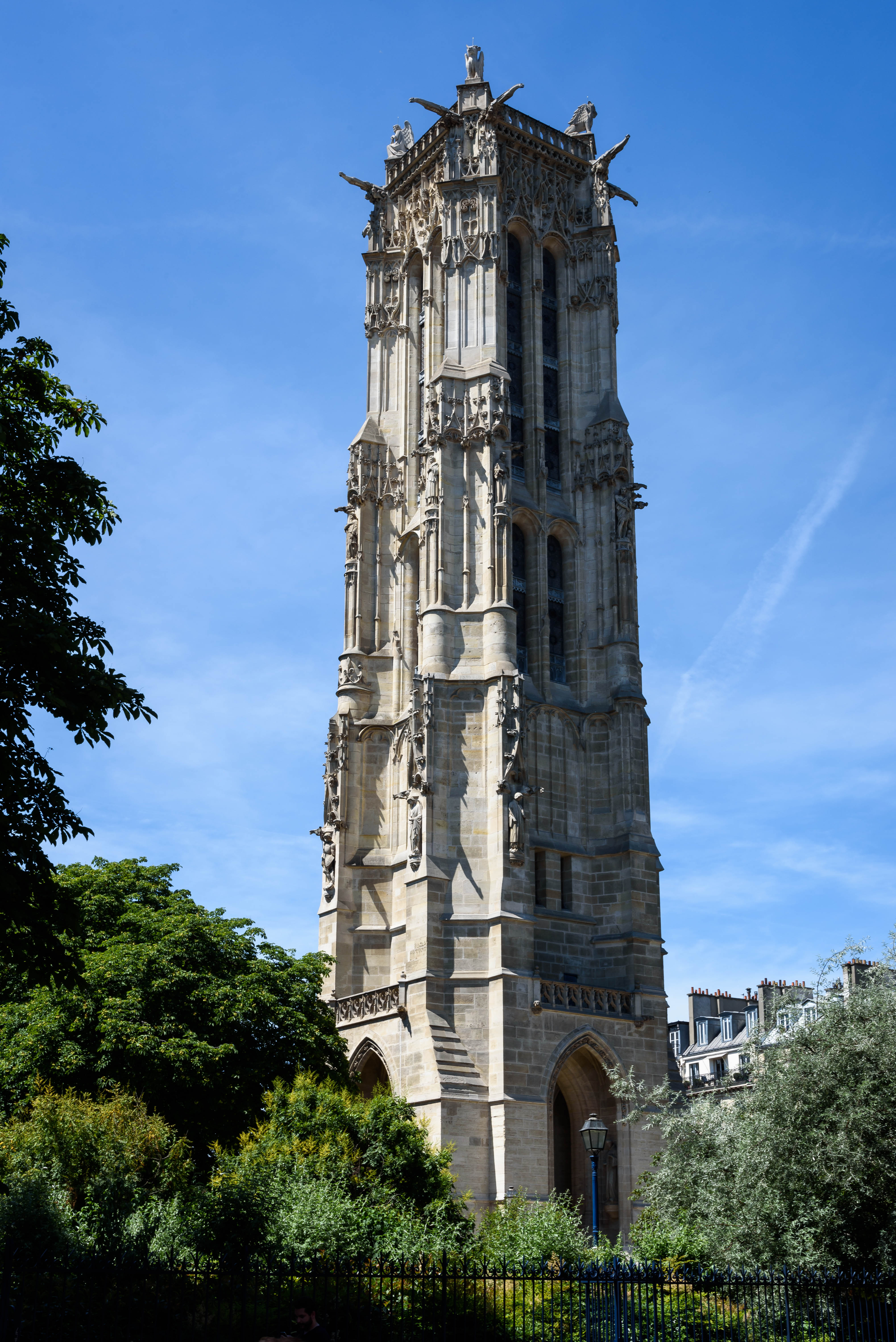 Saint-Jacques Tower, Paris.